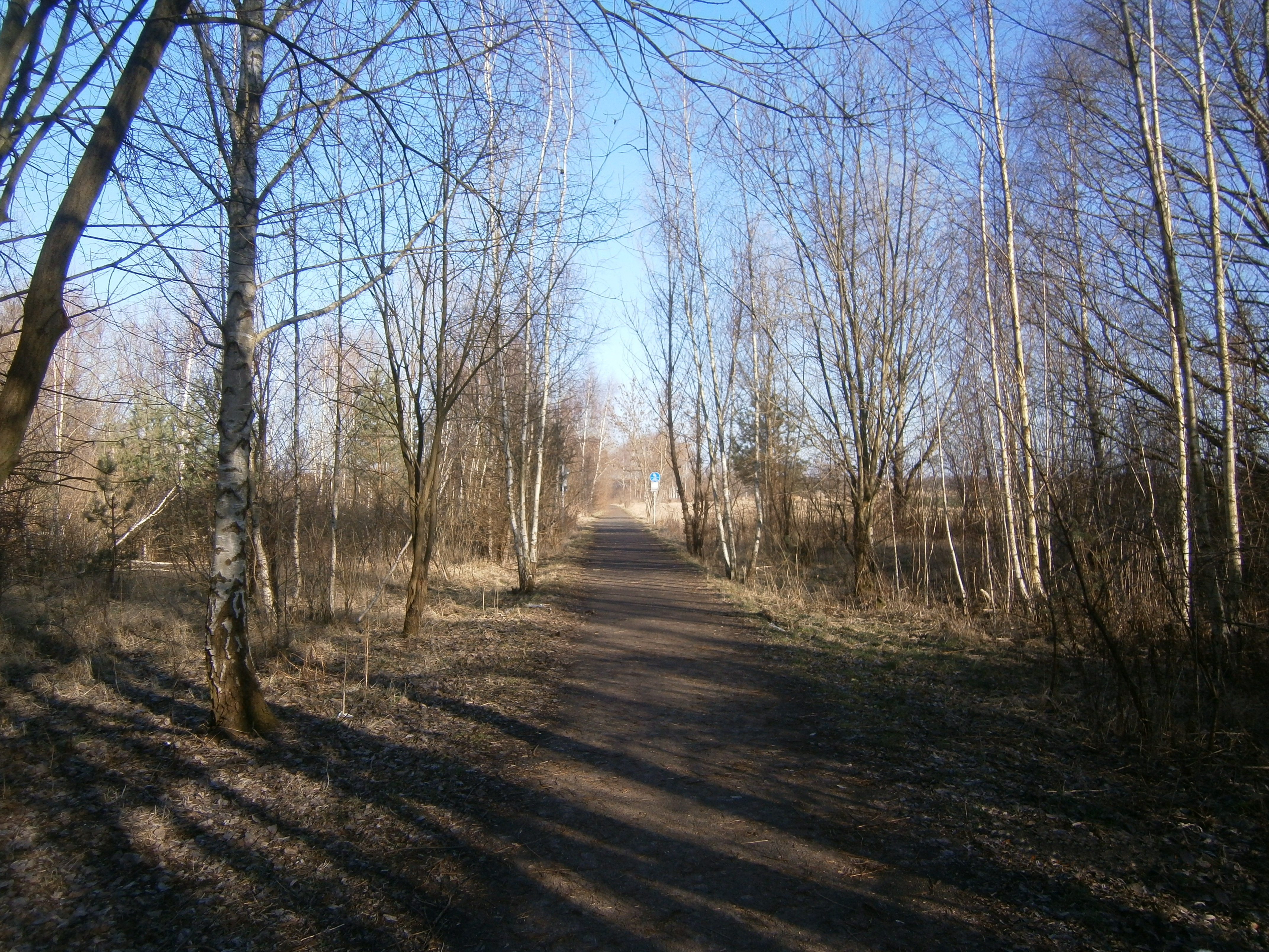 Berliner Mauerweg parallel zu Straße 127 aber westlicher von Rosenthal Richtung Blankenfelde.